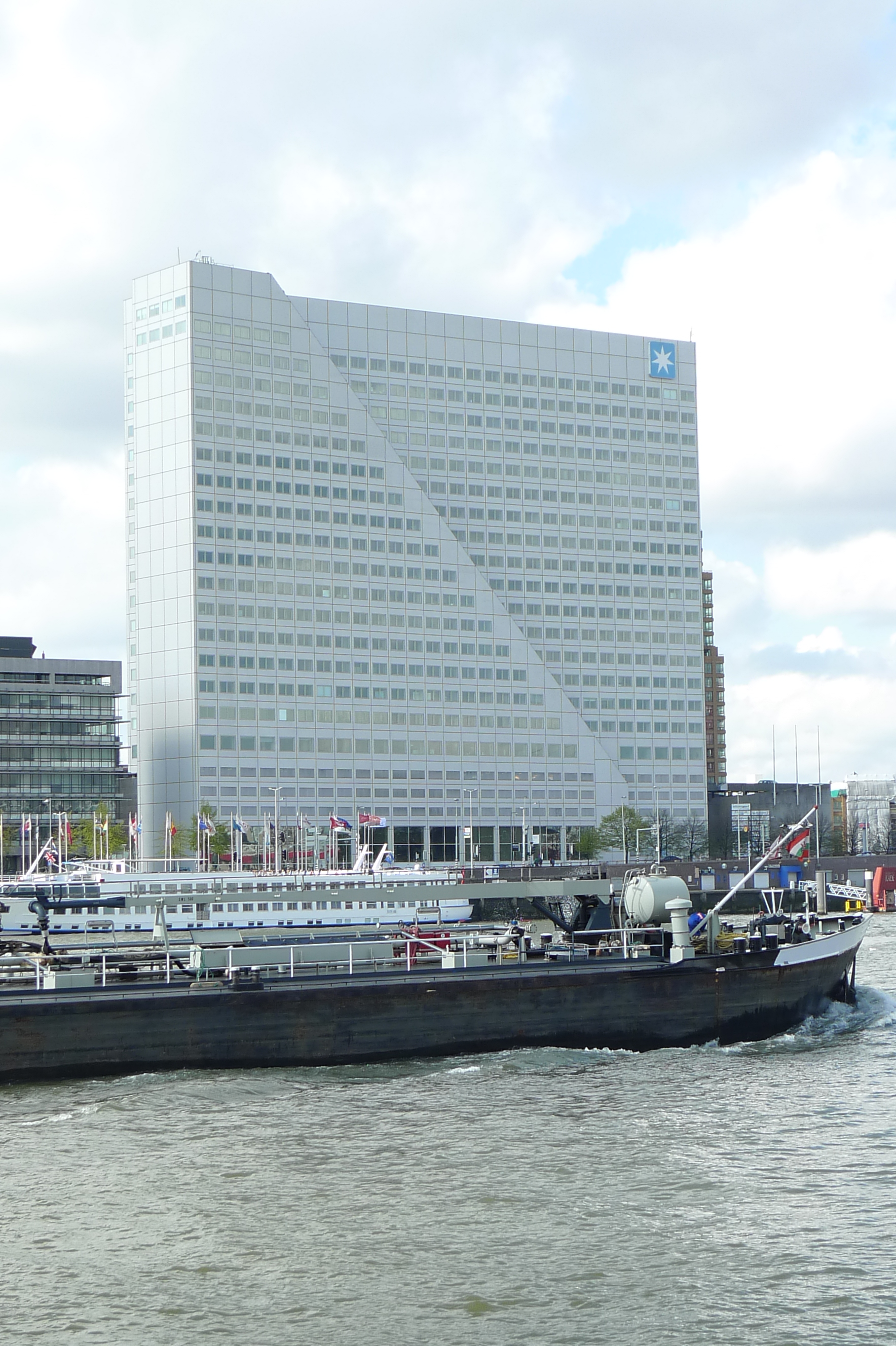 Rotterdam, Willemswerf met Maersk-logo rechtsboven.